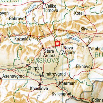 Karanowo - Lage des Ortes in Bulgarien